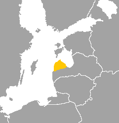 Idioma livonio.